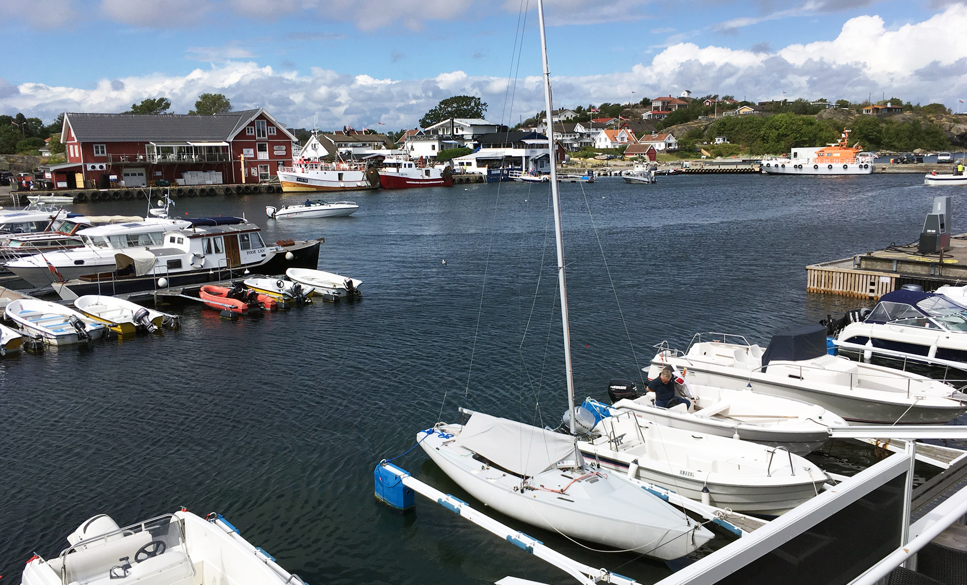 Sandøsund med lostbåtkaia til høyre i bakgrunnen 2017